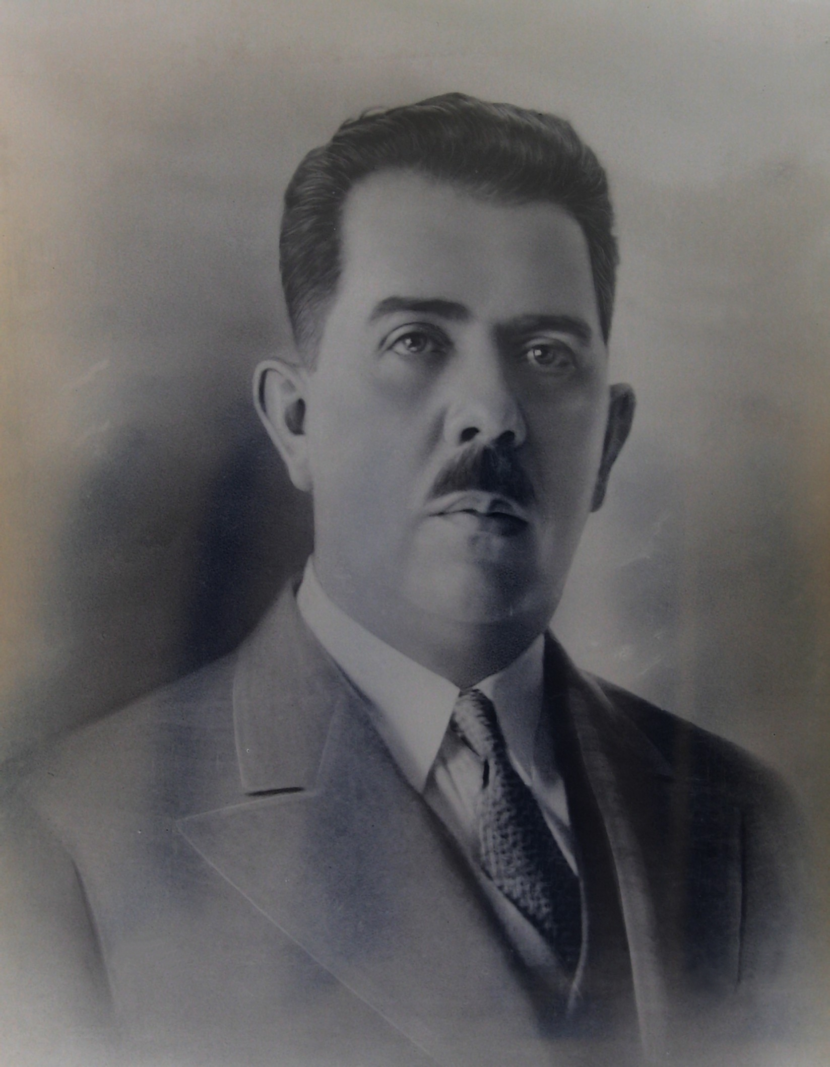 Mexican President Lázaro Cárdenas del Río